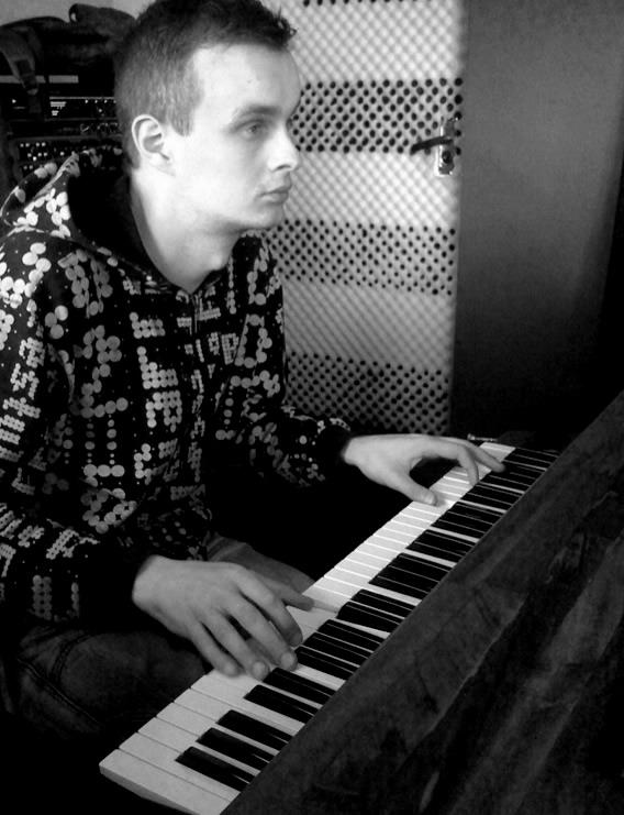 Marko Siilak, raadiomaja stuudios, 2012